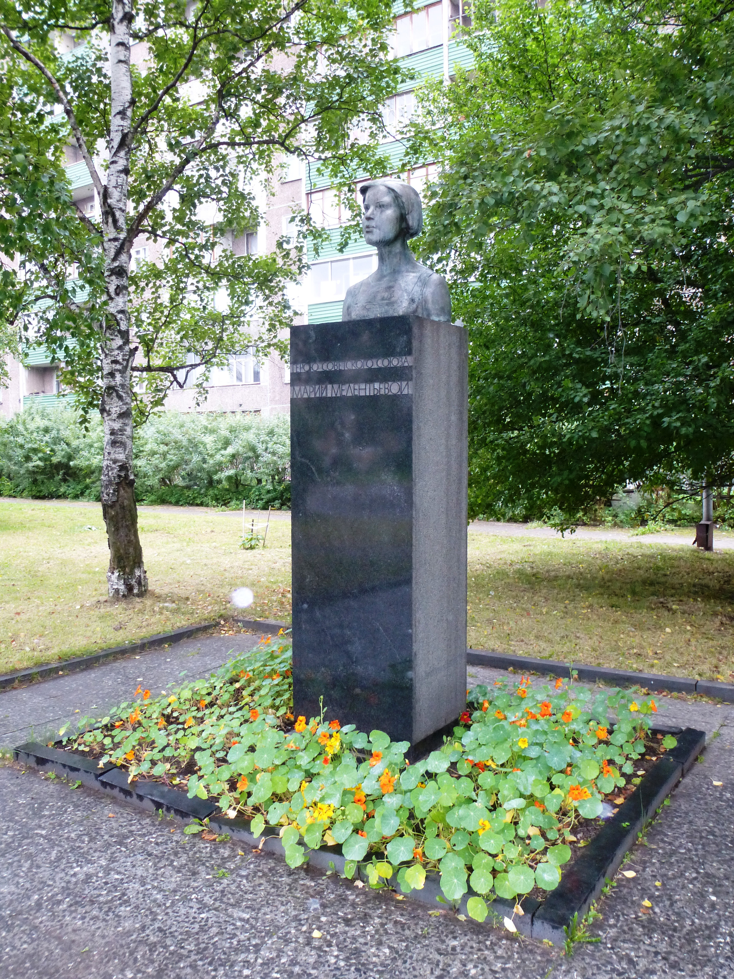 Памятник Герою Советского Союза Марии Мелентьевой в Петрозаводске на ул.Мелентьевой (скульптор Лео Ланкинен). Установлен в 1978 году.